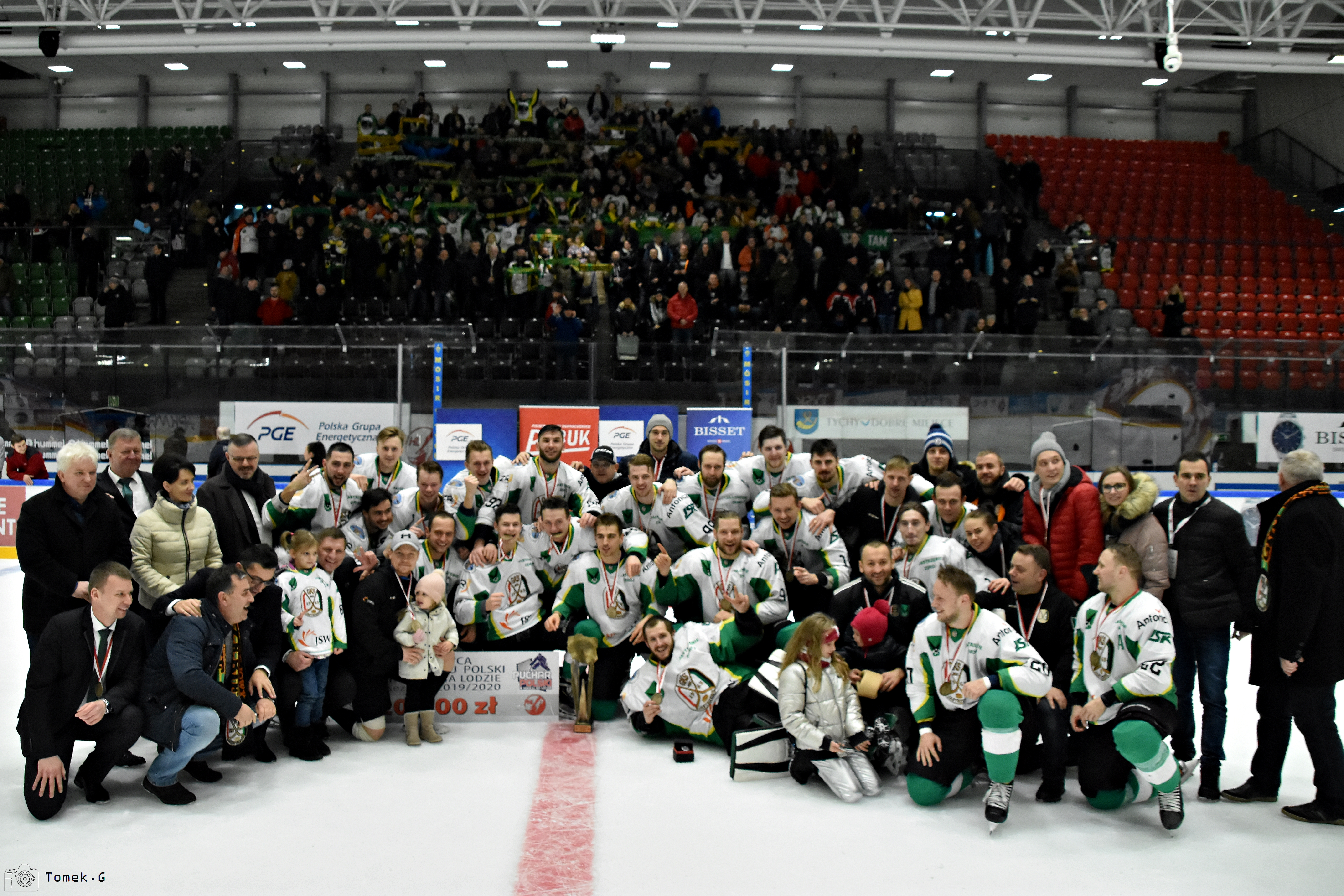 Puchar Polski w Hokeju na Lodzie 2019-2020